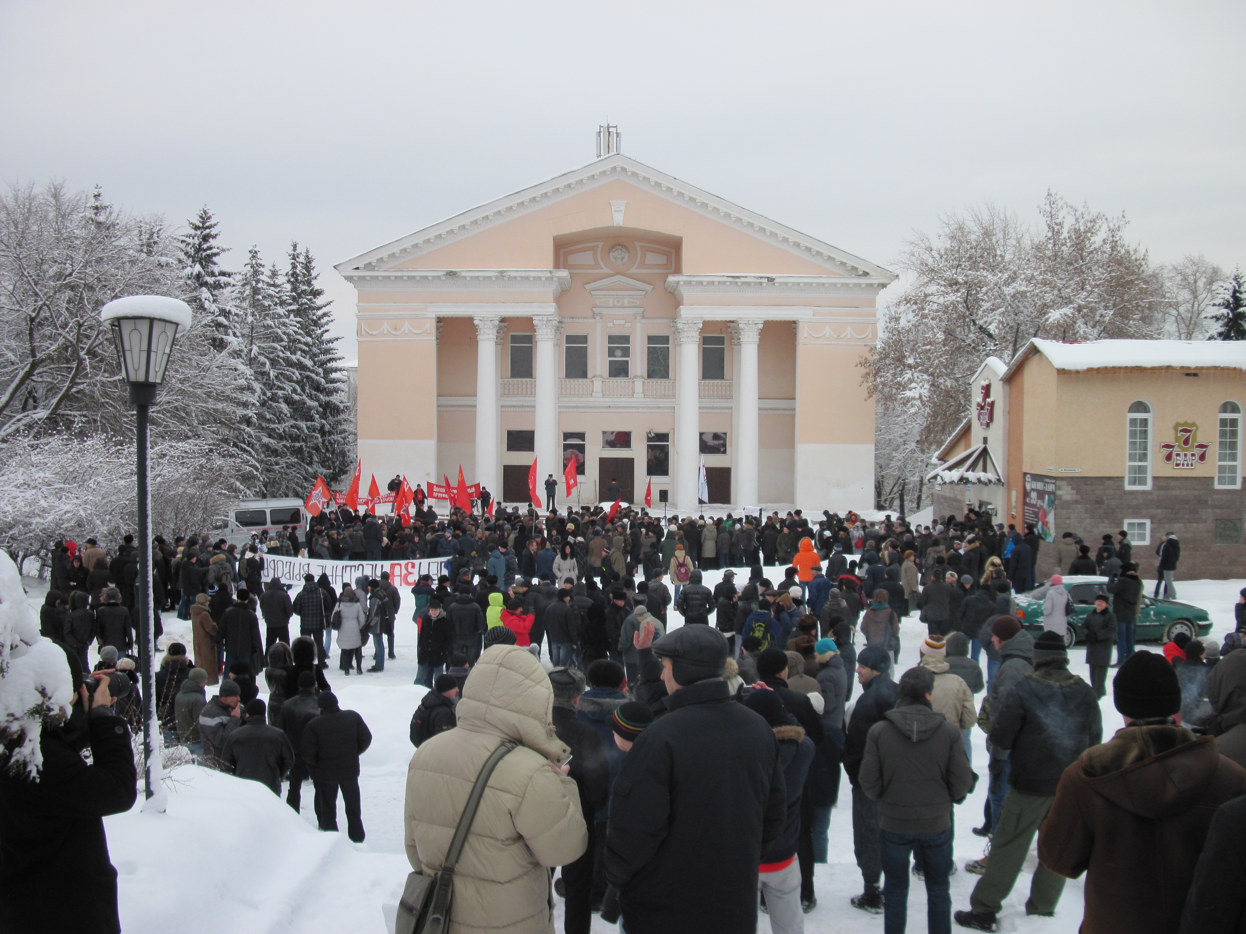 Митинг в Пензе 10 декабря 2011. Согласованный с властями митинг под лозунгом «За честные выборы» состоялся на площади у кинотеатра «Родина». В митинге приняло участие от 300 до 500 человек